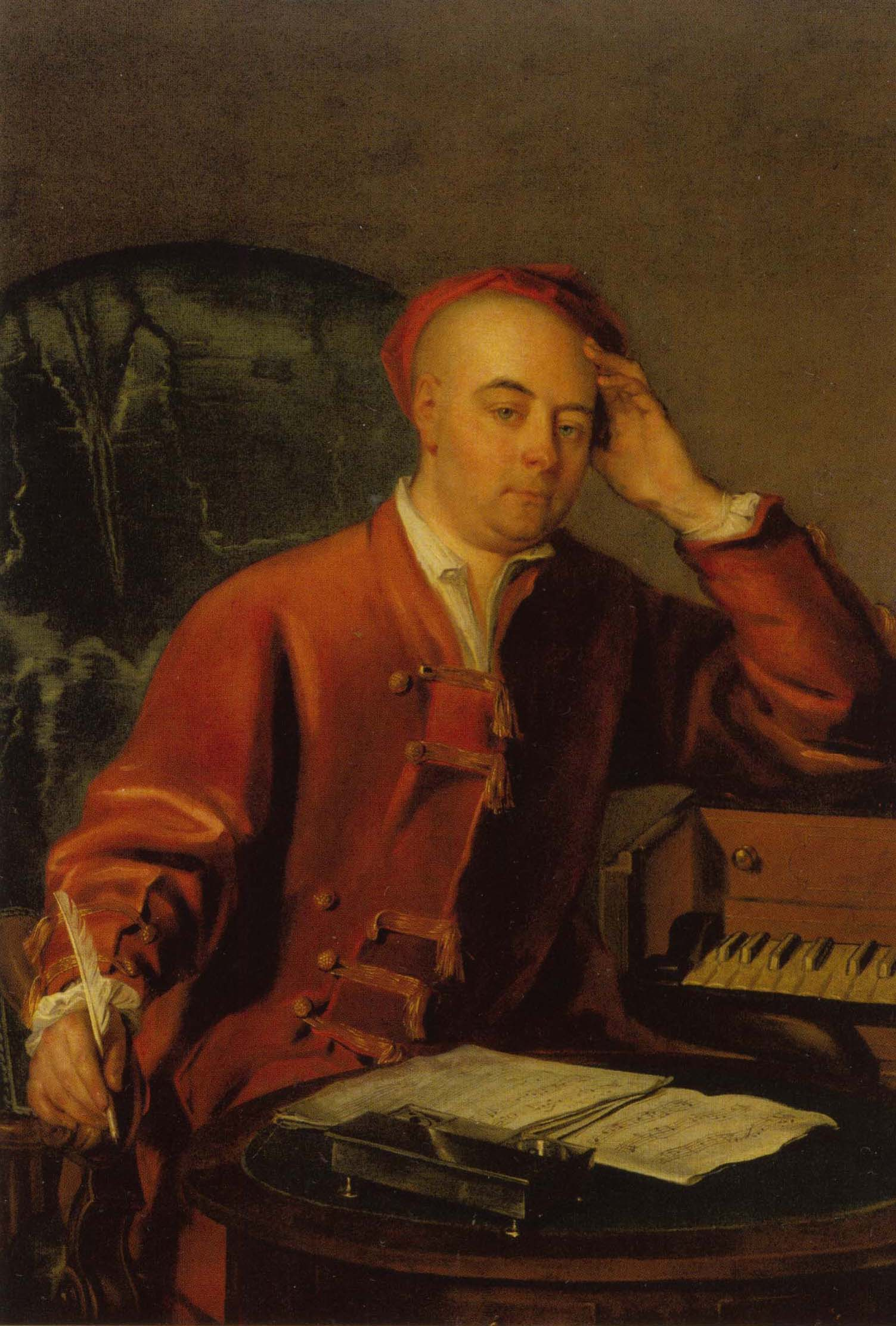 Depicted person: Georg Friedrich Händel